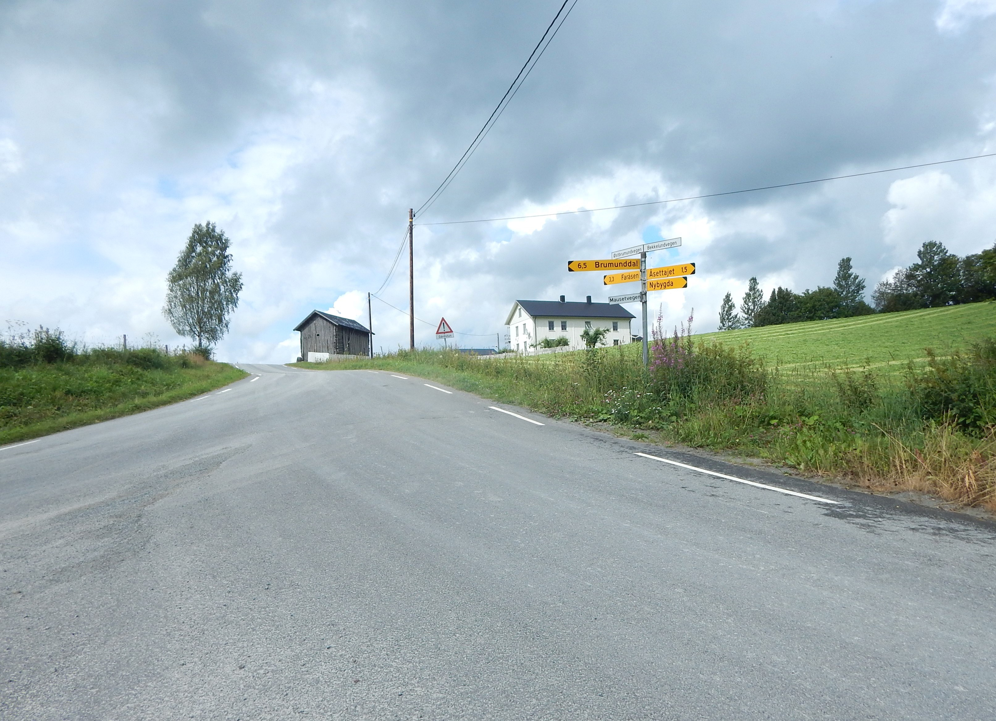 Østbrumundvegen (fylkesvei 1716, tidl. 51) ved krysset med Bekkelundvegen (fylkesvei 1720, tidl. 53)